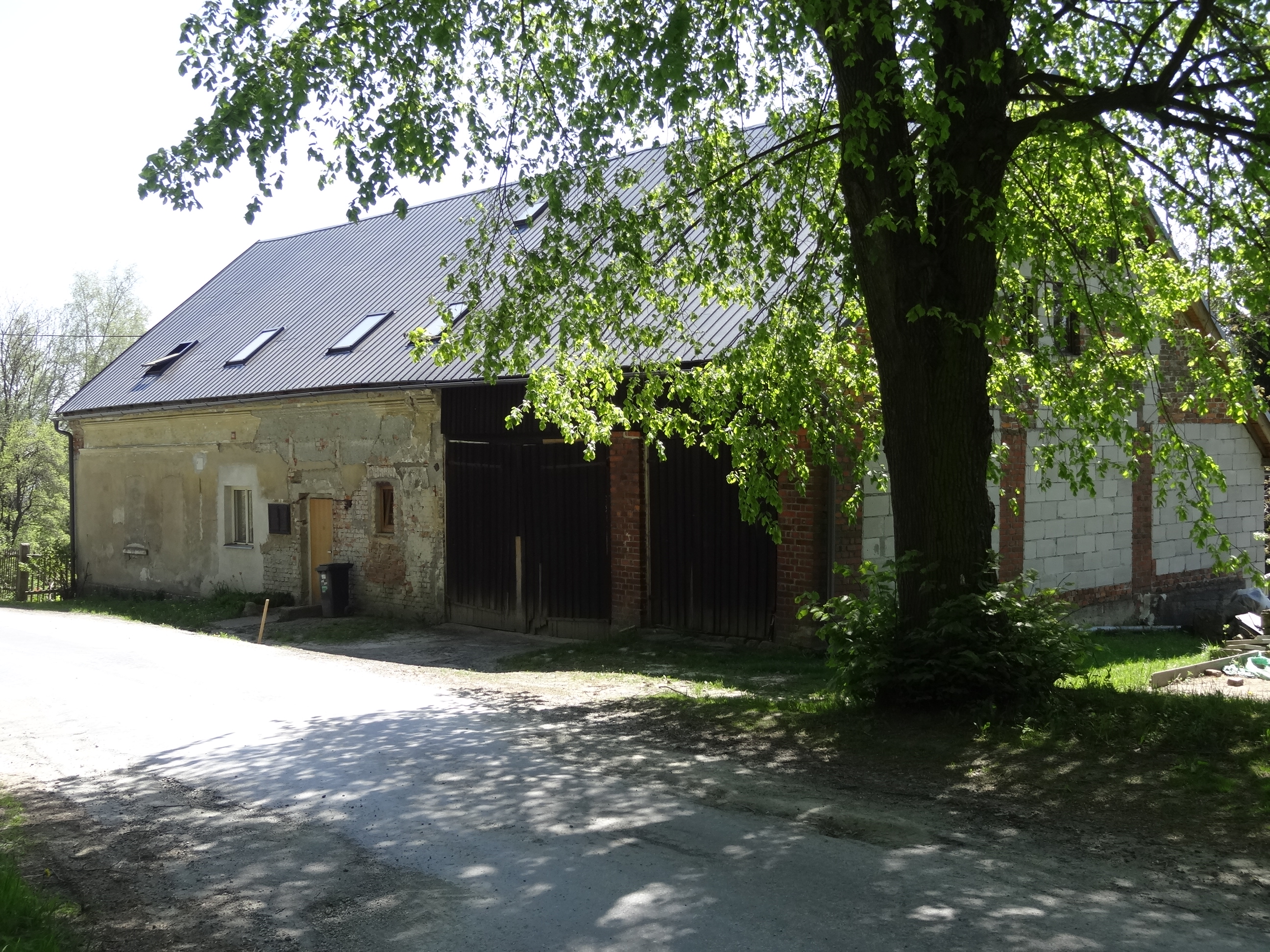 Košovy (u Rychnova u Jablonce nad Nisou) - chalupa čp. 463 (pod Kopaninou)